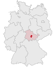 Ilm-Kreis, Thuringia, Germany